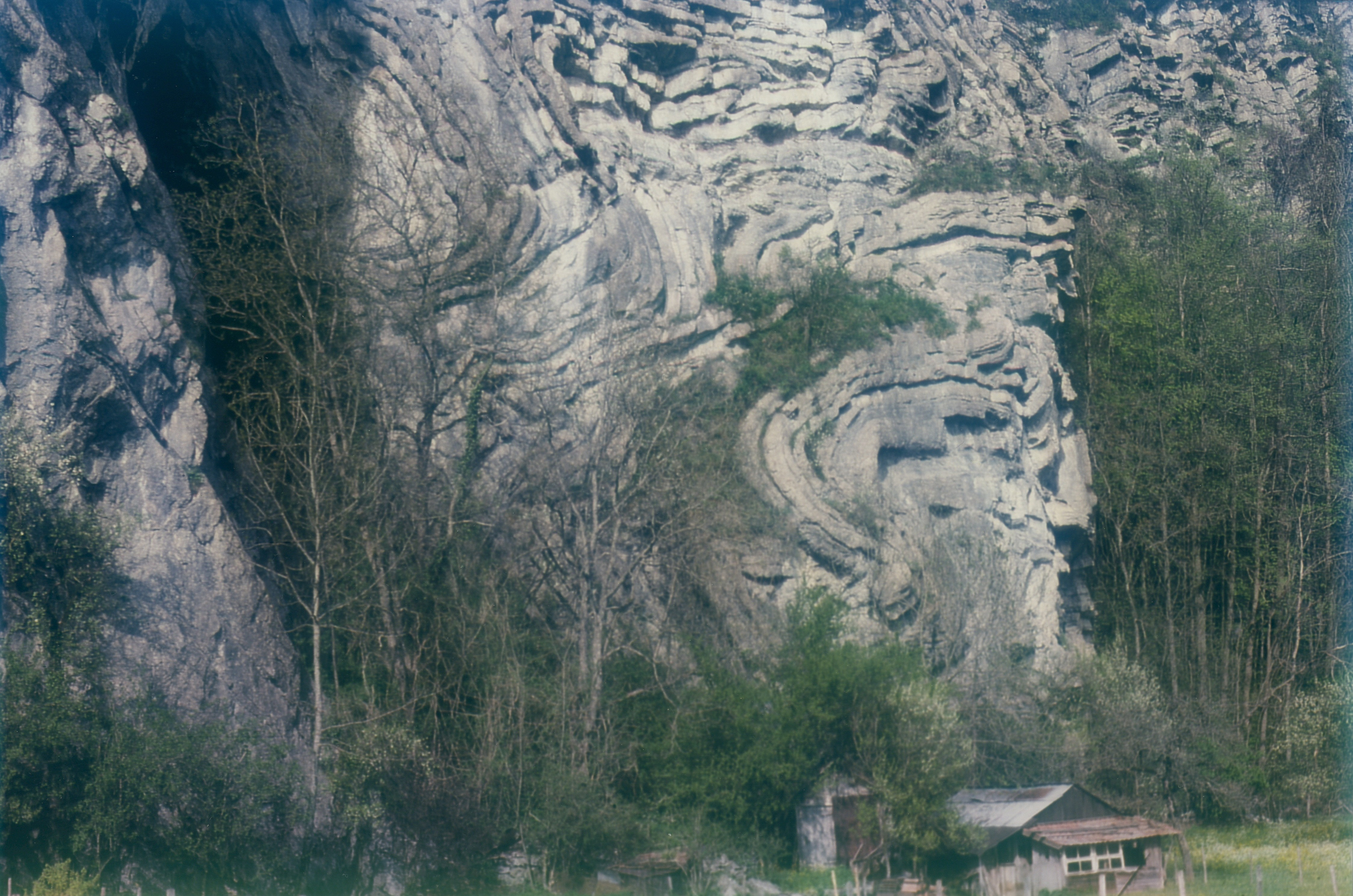 Stark gefaltete Sedimentgesteine an einem Prallhang des Aaretals; Bild aus dem auf Martin Wagenschein basierenden Lehrstücks "Wettersteine" (1997)